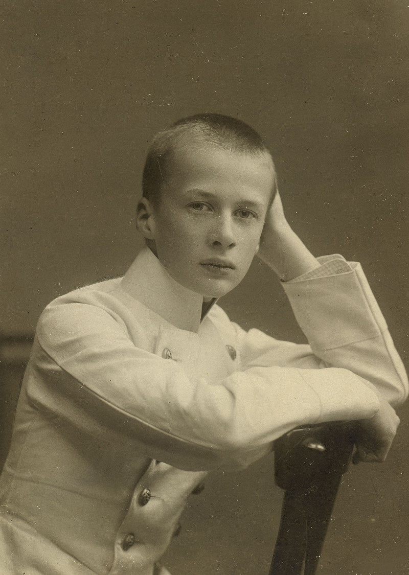 Prince Oleg Konstantinovich of Russia Agence Rol. Agence photographique, n.d. Le prince Oleg Constantinovitch de Russie : [photographie de presse] / [Agence Rol]. (s.l.): (s.n.)